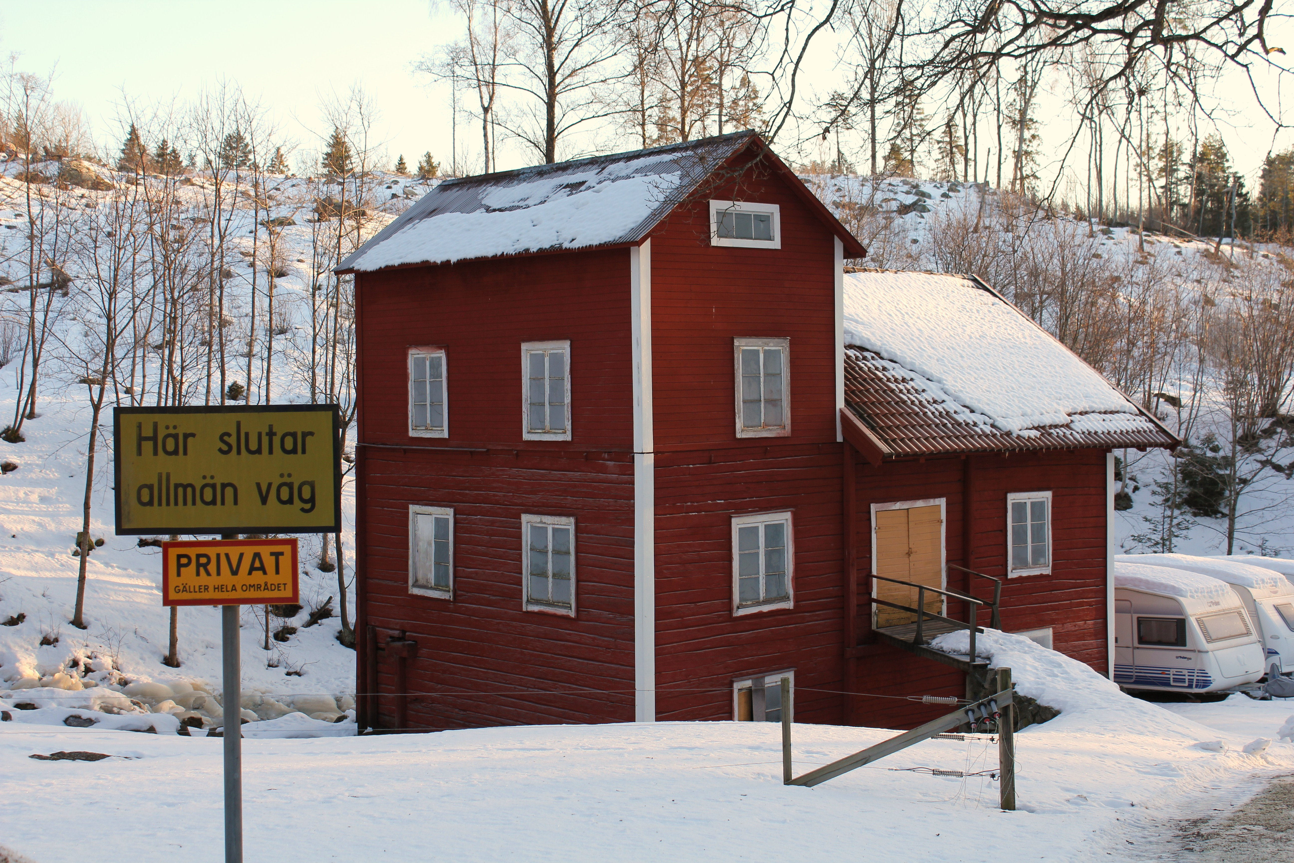 Norrga kvarn, Grödinge socken, Botkyrka kommun.